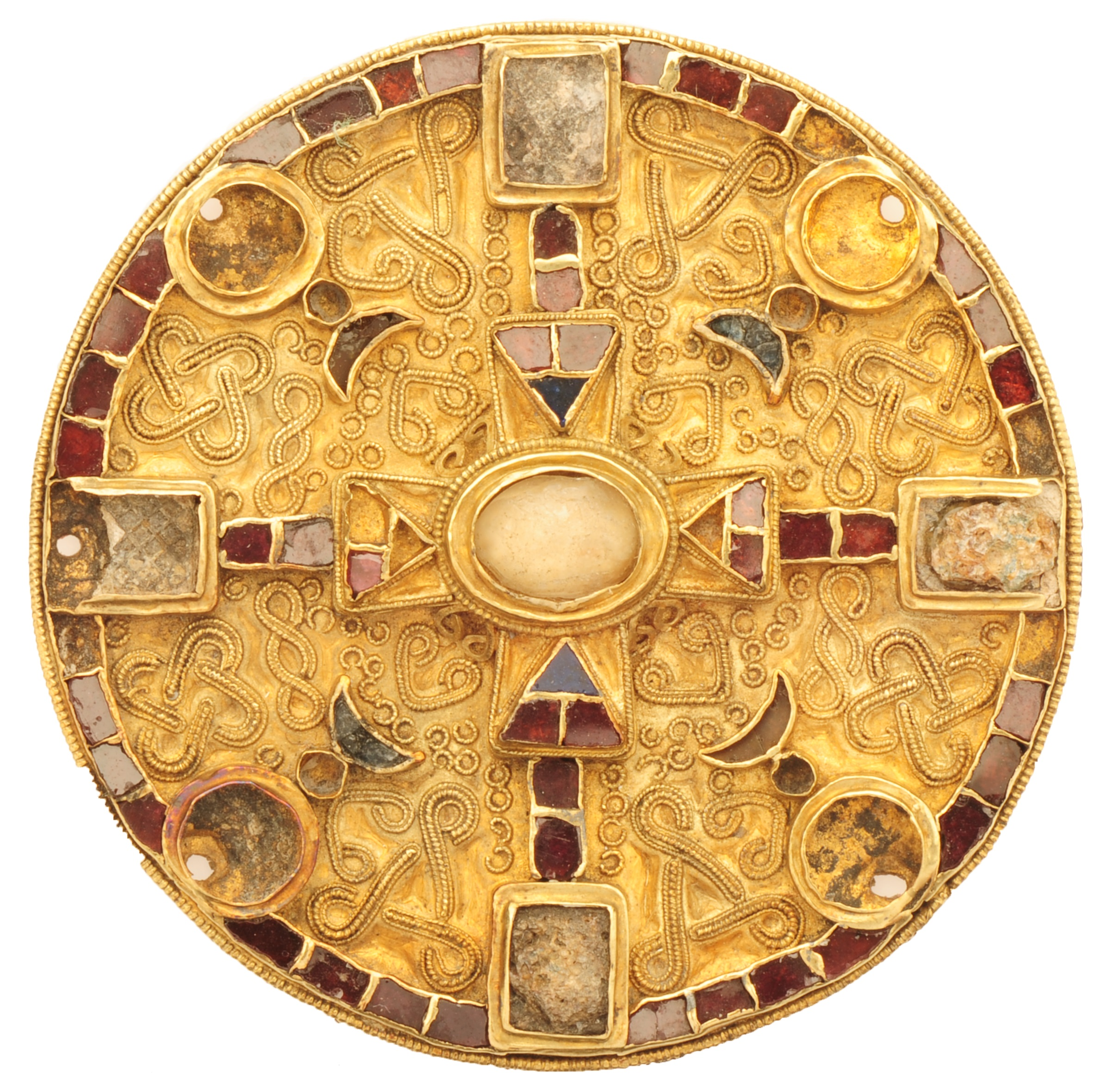 Schijffibula in goud en zilver met filigraanversiering en inlegwerk van almandienen en glas, 575 tot 700 NC, vindplaats: Rosmeer, Diepestraat, Merovingisch grafveld, 1969, graf 90, collectie Gallo-Romeins Museum Tongeren, 76.C.260